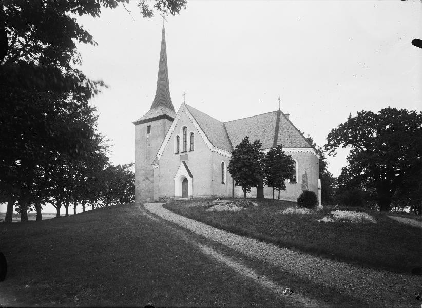 Kyrkan från sydväst.